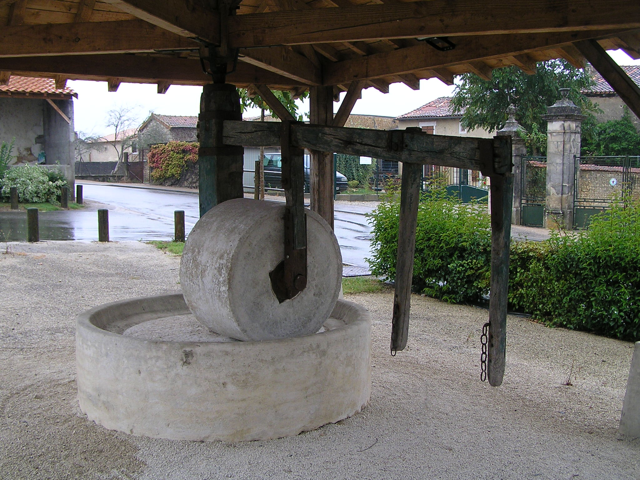 meule à grains à Agris en Charente